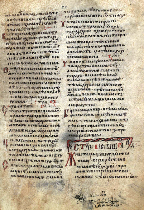 Софийски октоих